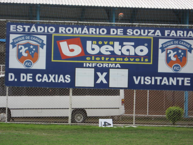 Vista do placar do estádio Marrentão, em Xerém, Duque de Caxias